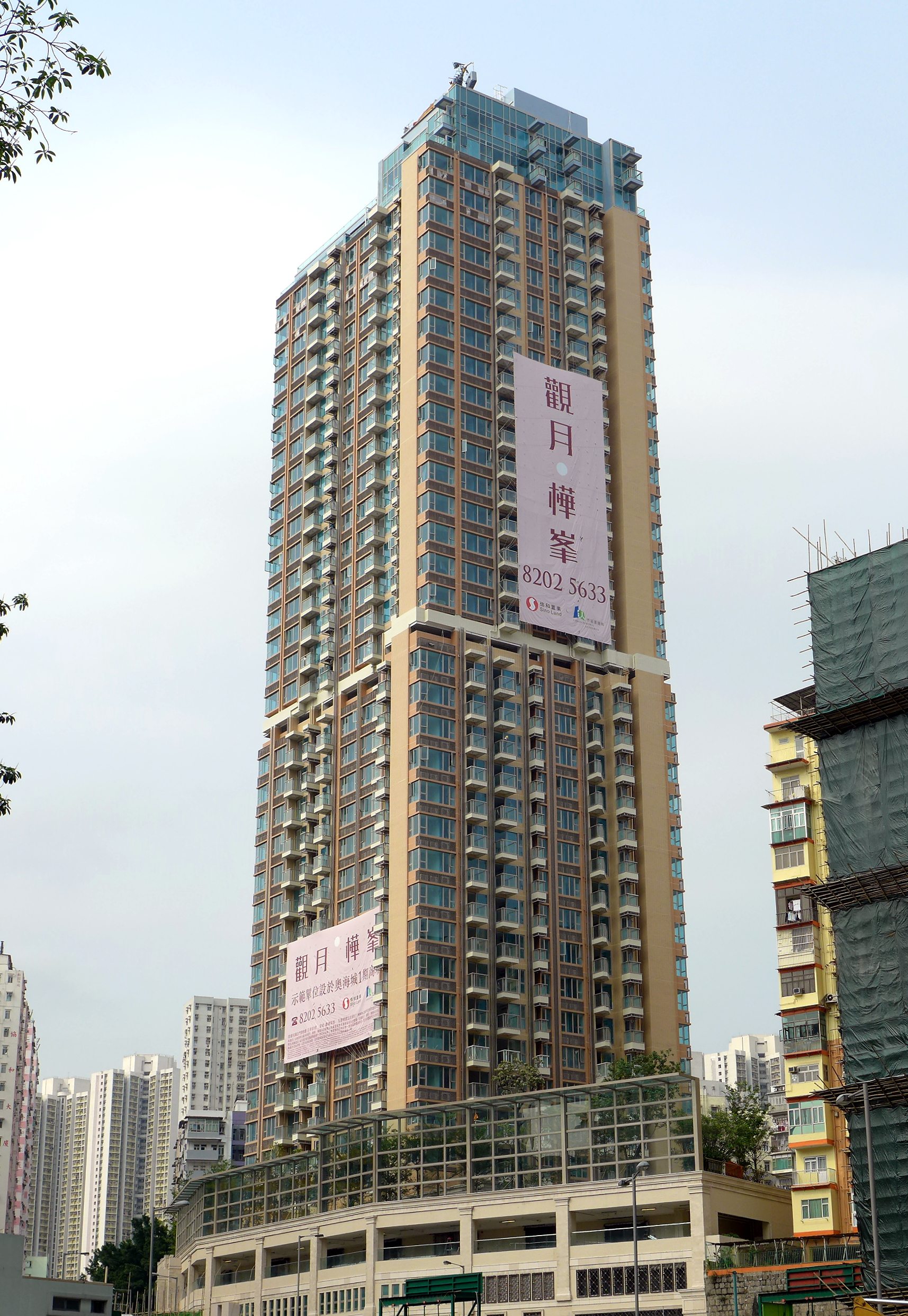 Park Metropolitan 觀月·樺峯